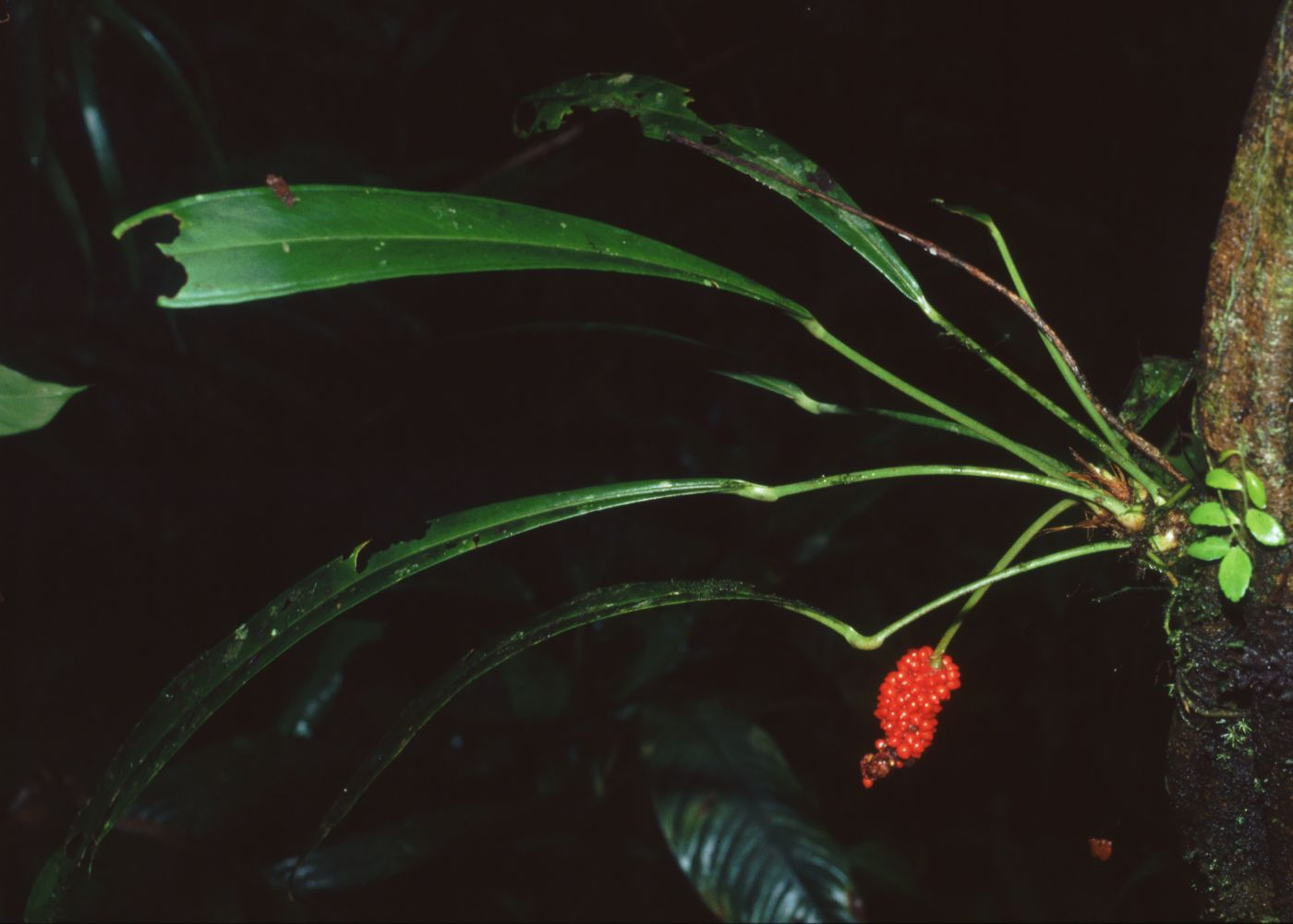 Anthurium bakeri, Aronstabgewächse (Araceae) – Costa Rica: Prov. Puntarenas, PN Piedras Blancas, Bosque Esquinas bei La Gamba, "Ocelot Trail"